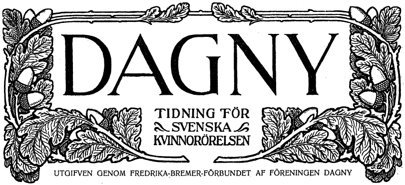 Logotyp för tidningen Dagny. Just denna är från 1909 men har troligen sett likadan ut flera år tidigare